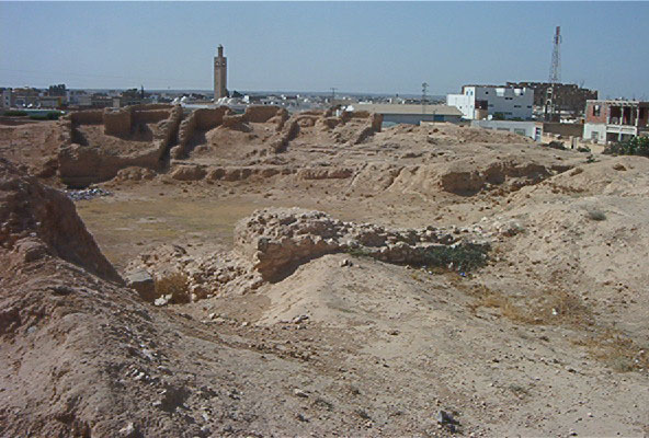 Vue générale du site des anciens amphithéâtres d'El Jem, près du musée actuel.